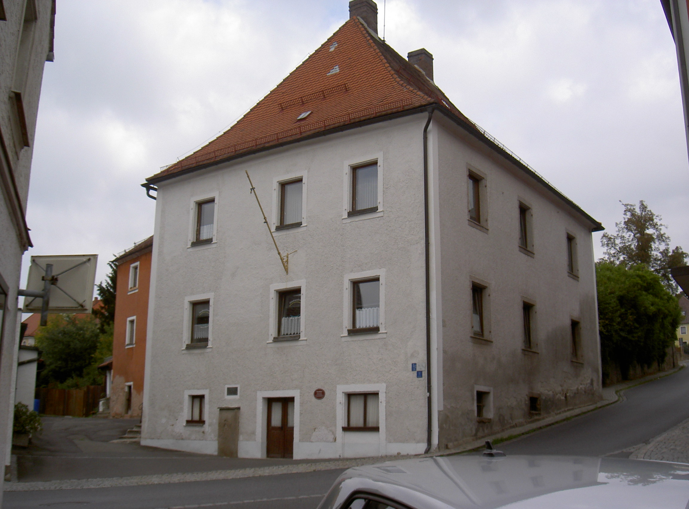 Podewilshaus Floß (Upper Palatinate)